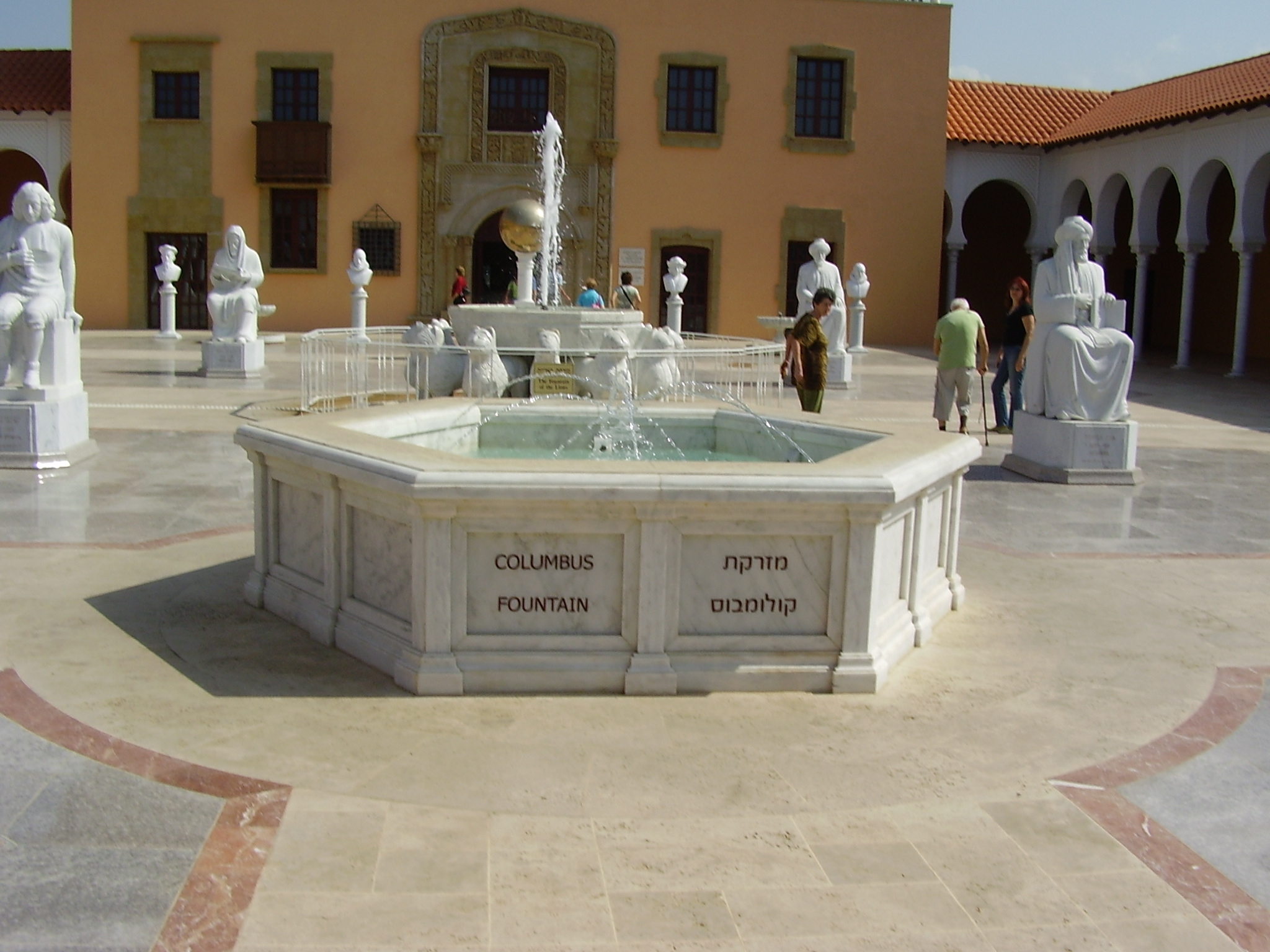 ralli museum, cesarea, israel